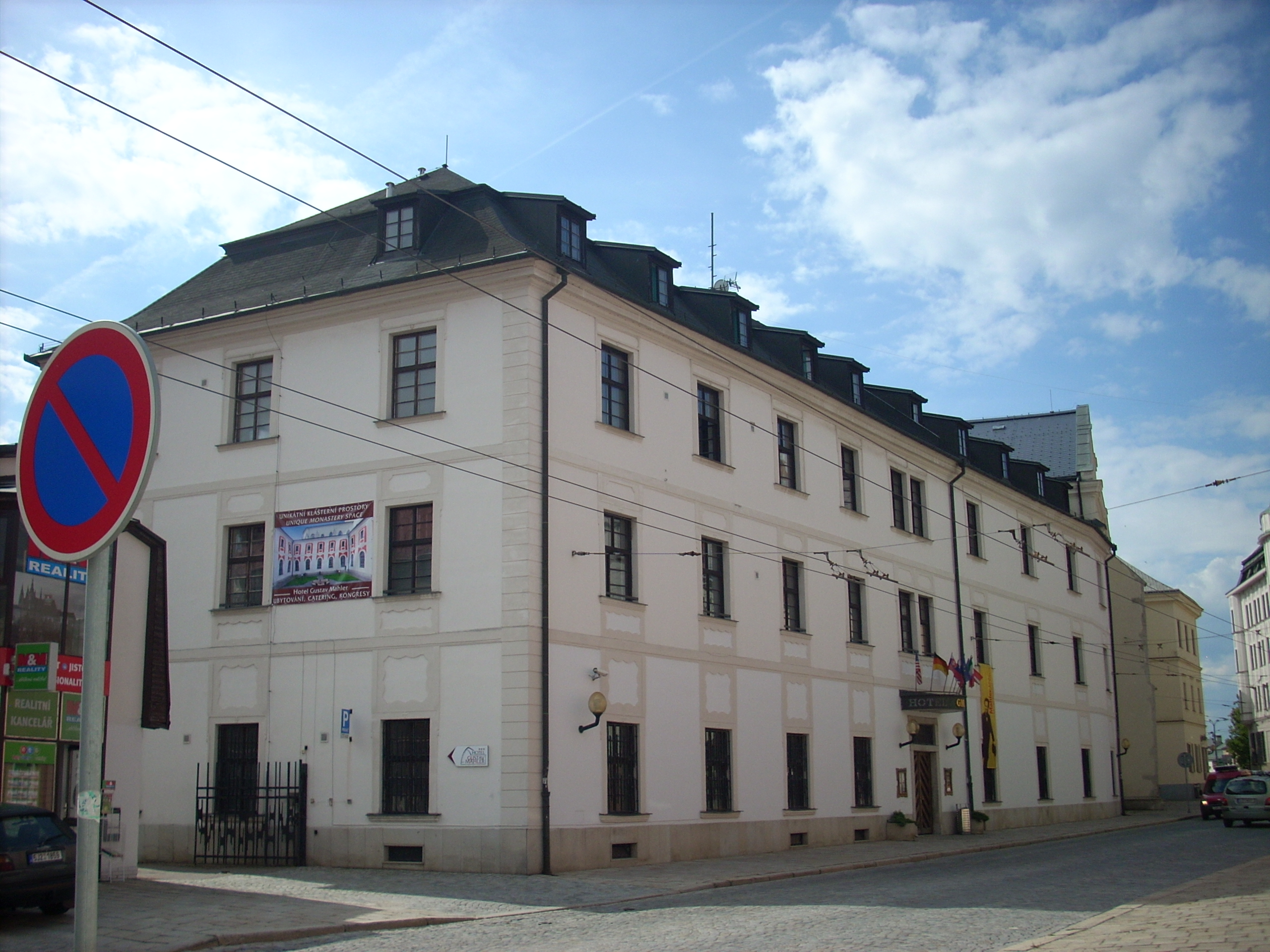 Hotel Gustav Mahler Jihlava, Křížová 4